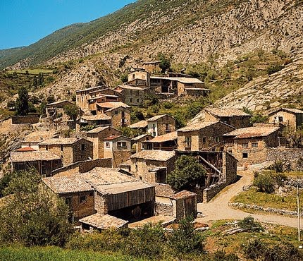 Foto antiga del poble de Cabó.